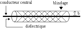 Schéma d'une ligne coaxiale Créé par utilisateur Lucien Duval le 27 nov 2005